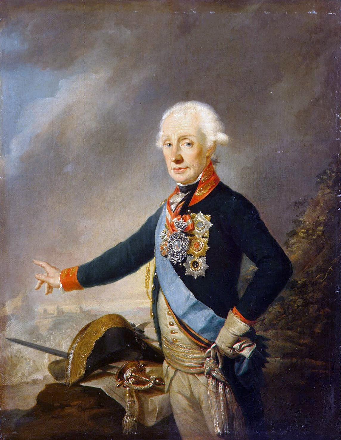 Portrait of Alexander Suvorov И. Крейцингep. Портрет А. В. Суворова. 1799